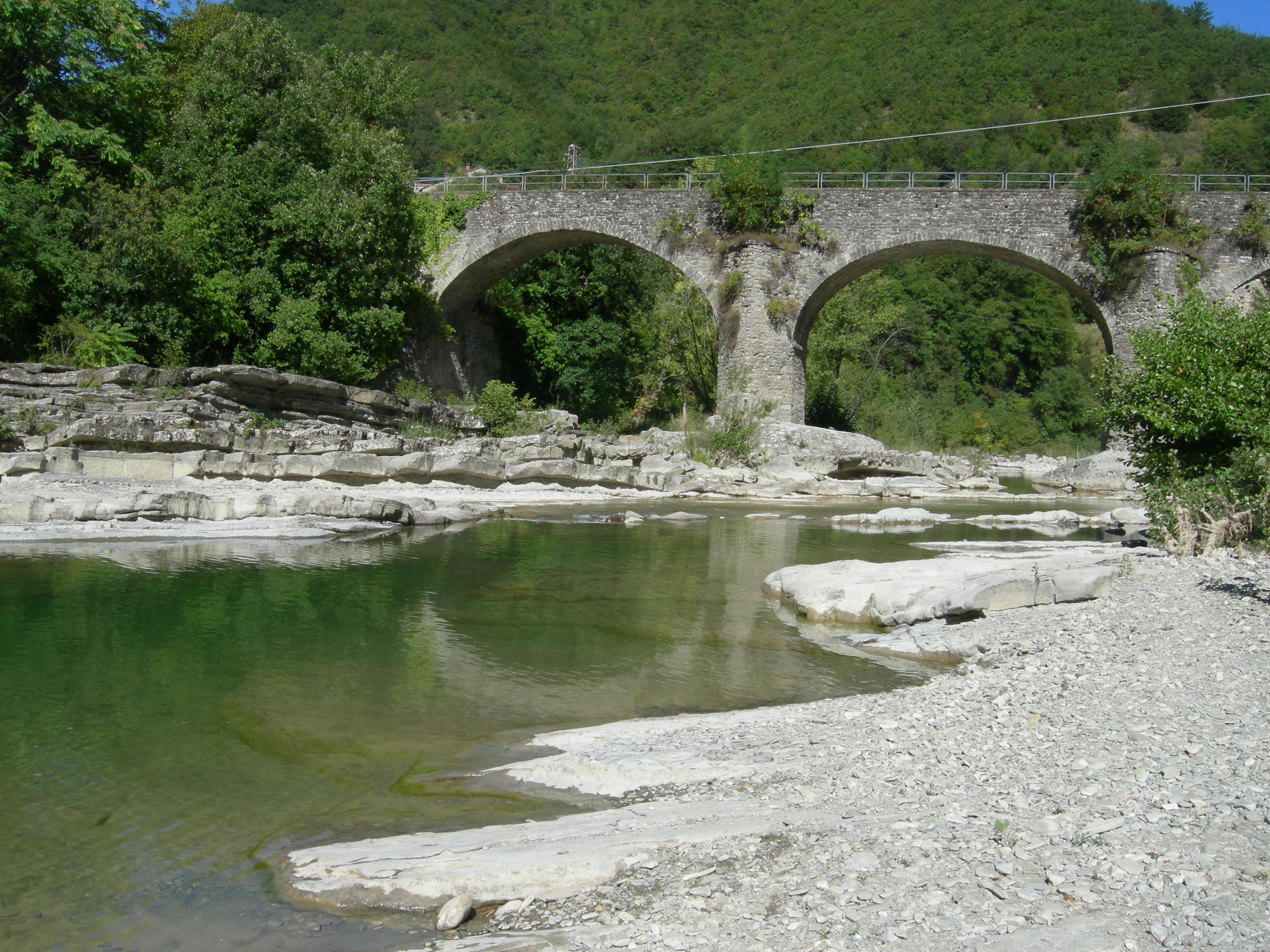 Santerno